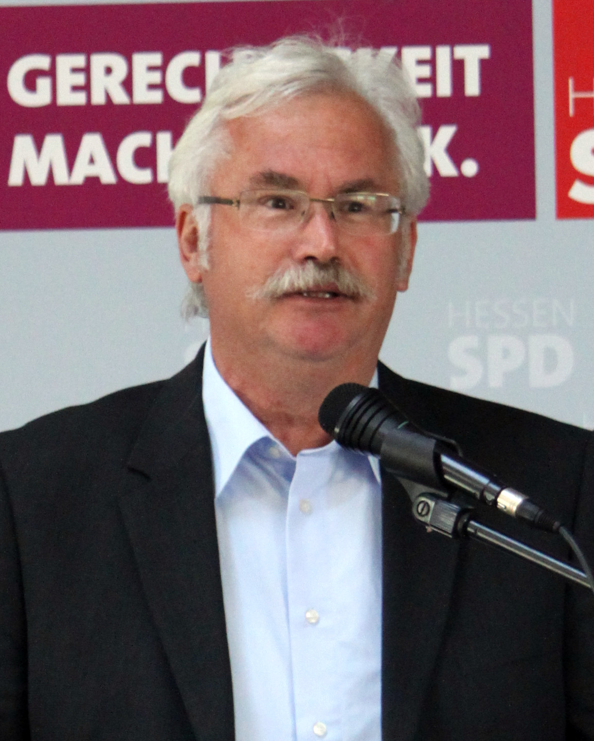 Helmut Jung auf der Delegiertkonferenz des SPD-Unterbezirks Limburg-Weilburg am 17. Mai 2014 in Beselich-Schupbach.